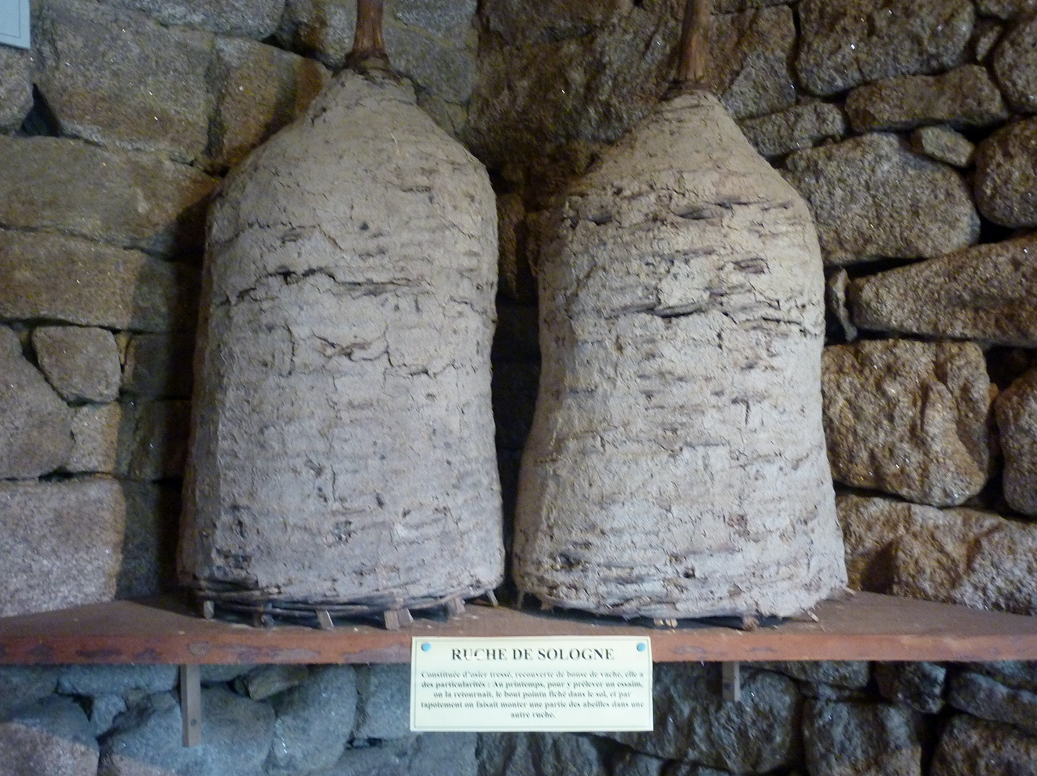 Le Faouët (Morbihan) : musée de l'Abeille Vivante et la Cité des Fourmis, ruches de Sologne, constituées d'osier tressé et de bouse de vache